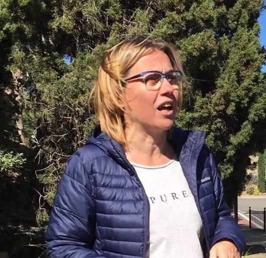 Teresa Vallverdú en un acte al Priorat (2017)